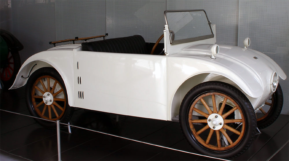 Hanomag Kommissbrot , am 3.10.2004 im EFA-Museum für Deutsche Automobilgeschichte first upload in de Wikipedia on 20:02, 4. Okt 2004 by Softeis